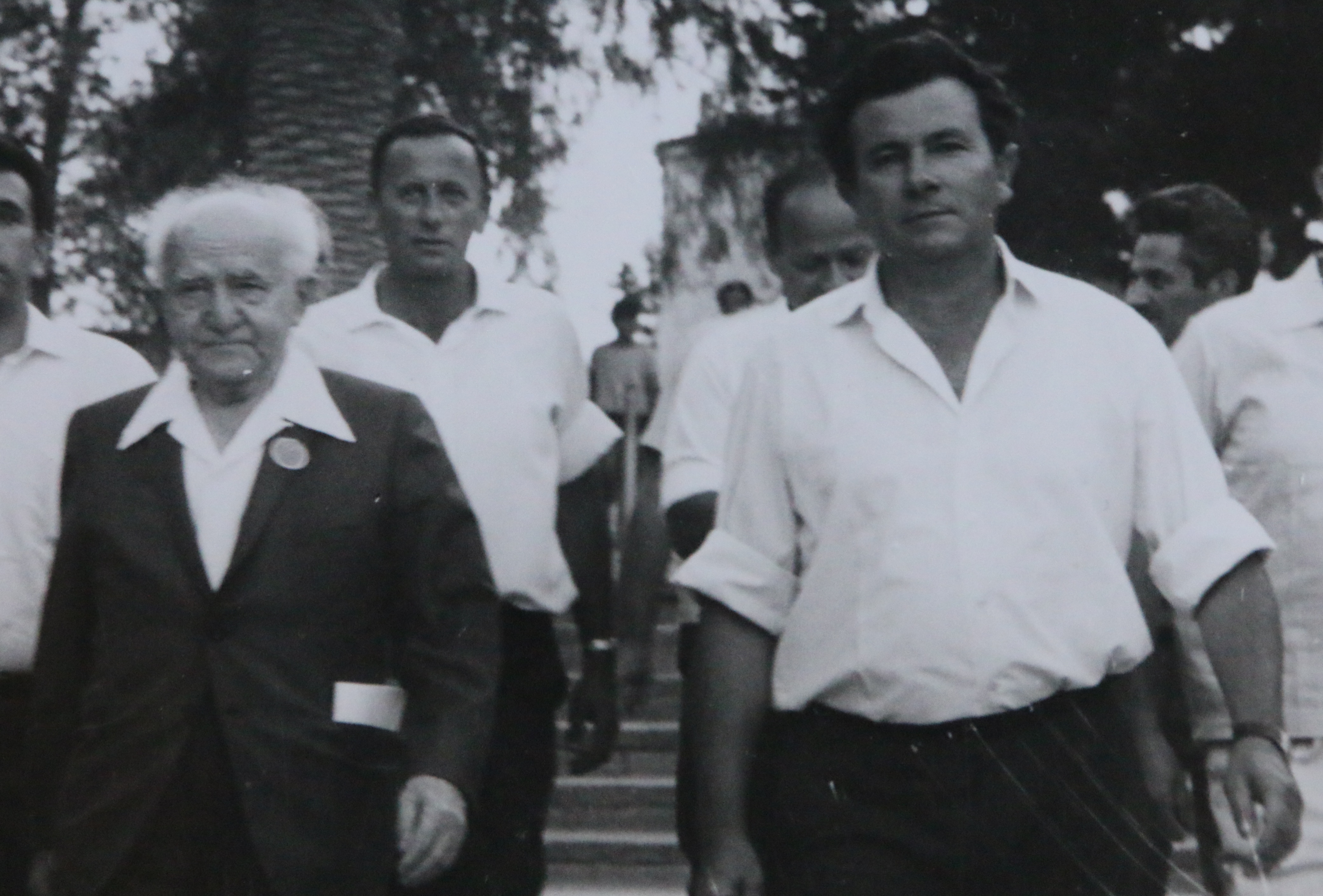 ראש הממשלה דויד בן גוריון צועד לצד מארגן הטקס מר יהודה אילן ב1960